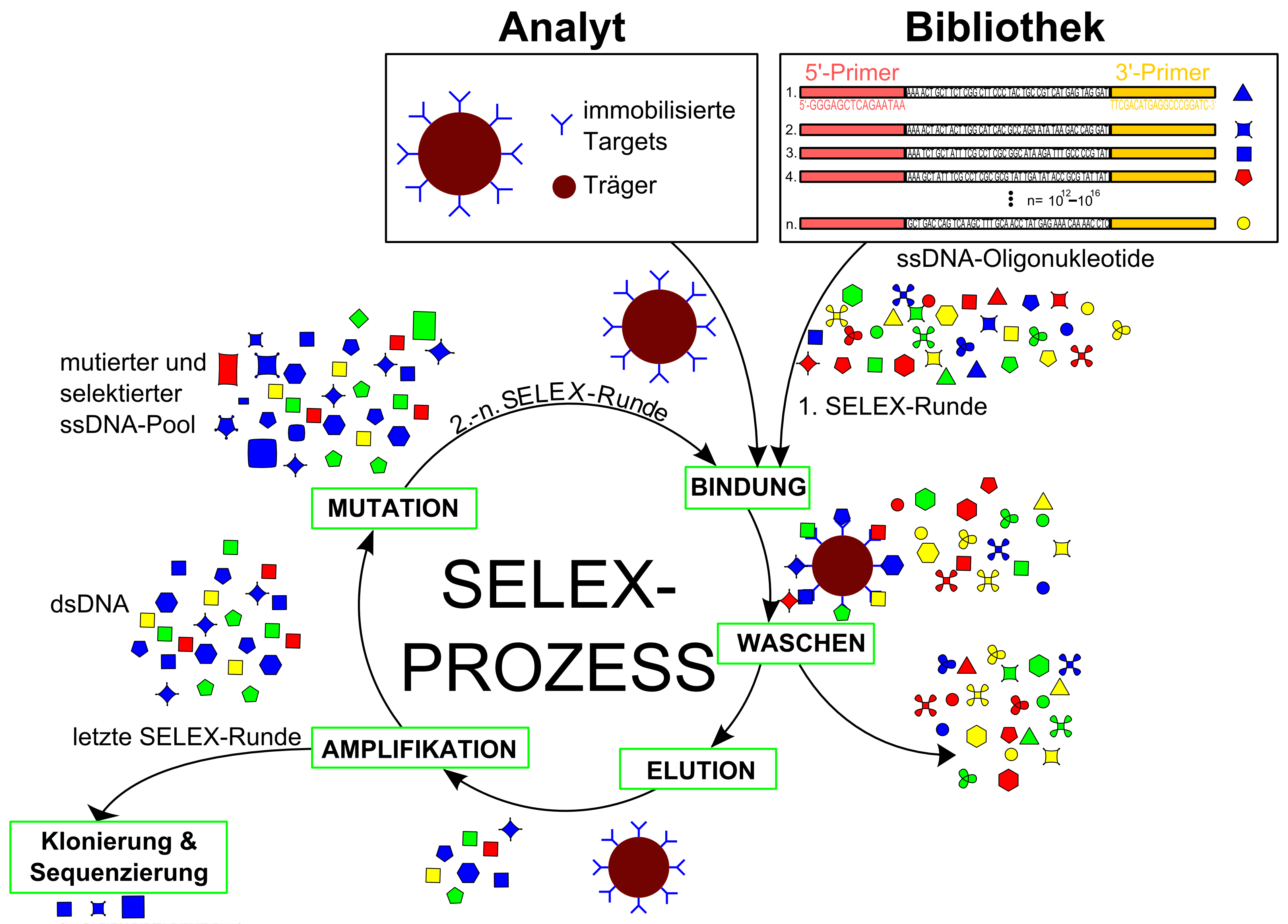 Der SELEX-Prozess (Systematic Evolution of Ligands by EXponential Enrichment, zu deutsch: Systematische Evolution von Liganden durch exponentielle Anreicherung)